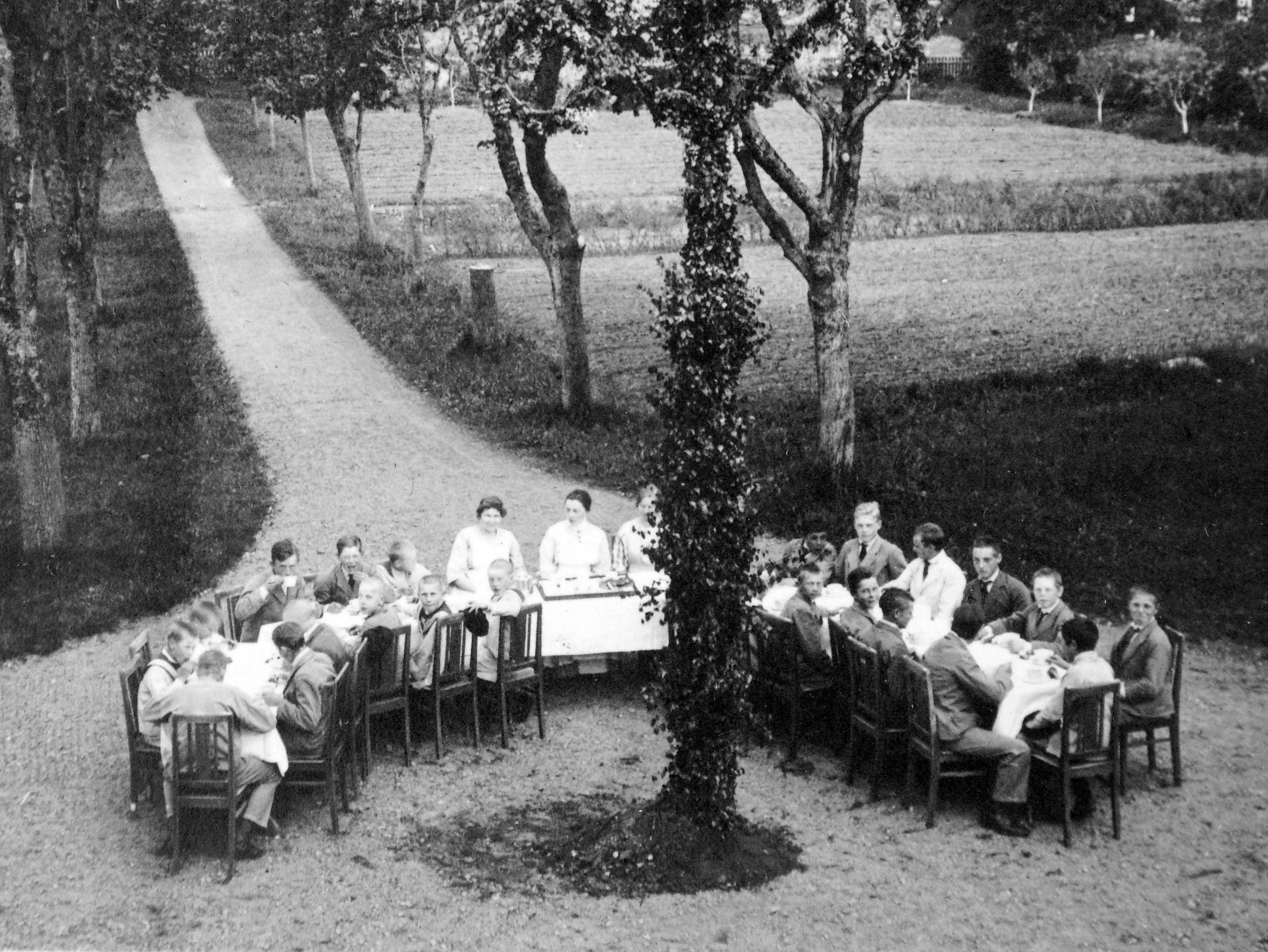 Gizella-telep, OTI szanatórium parkja. Location: Hungary, Visegrád Tags: tableau Title: Gizella-telep, OTI szanatórium parkja.